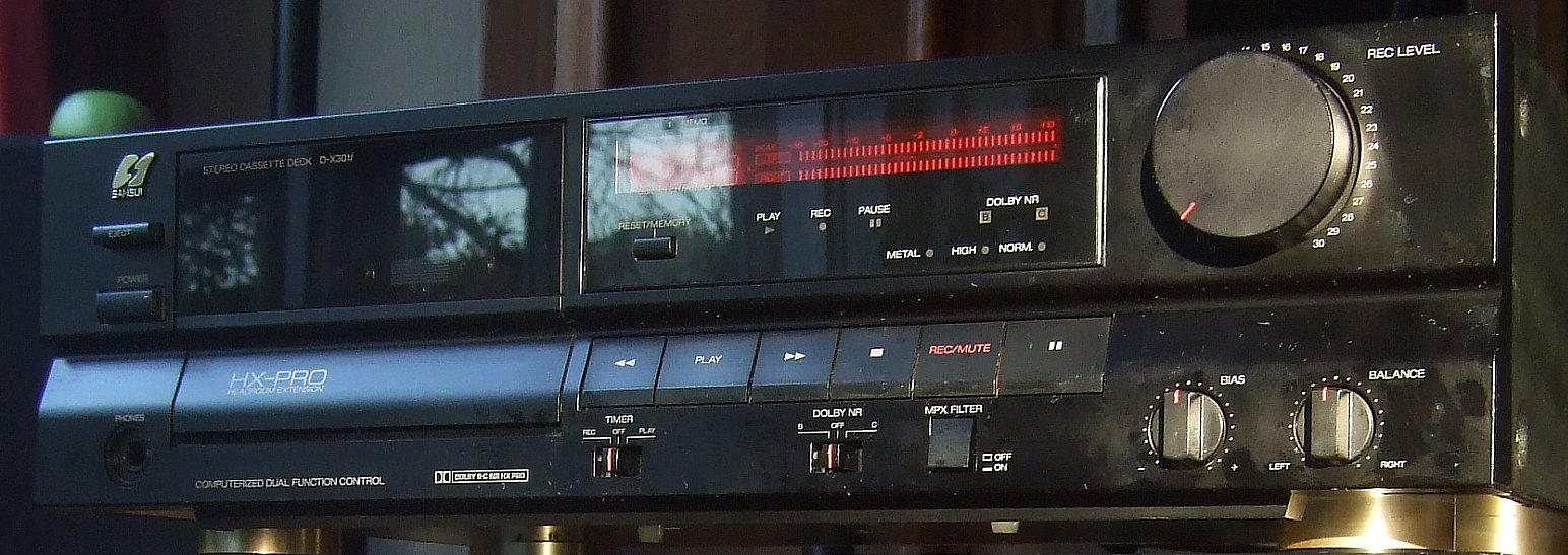 Sansui D-X301i Cassette Recorder Deck